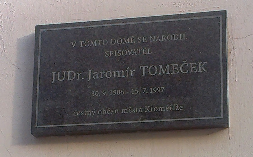 Vodní 94, Vodní 94/12, Kroměříž.